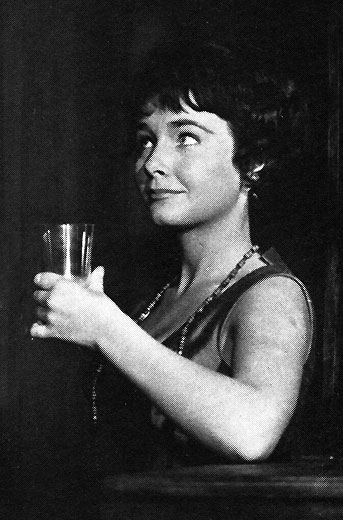 Lena Granhagen in Irma la Douce. Scalateatern, Stockholm